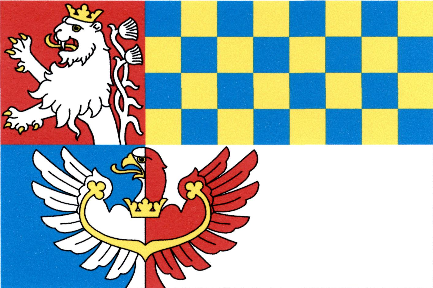 Vlajka obce Pnětluky